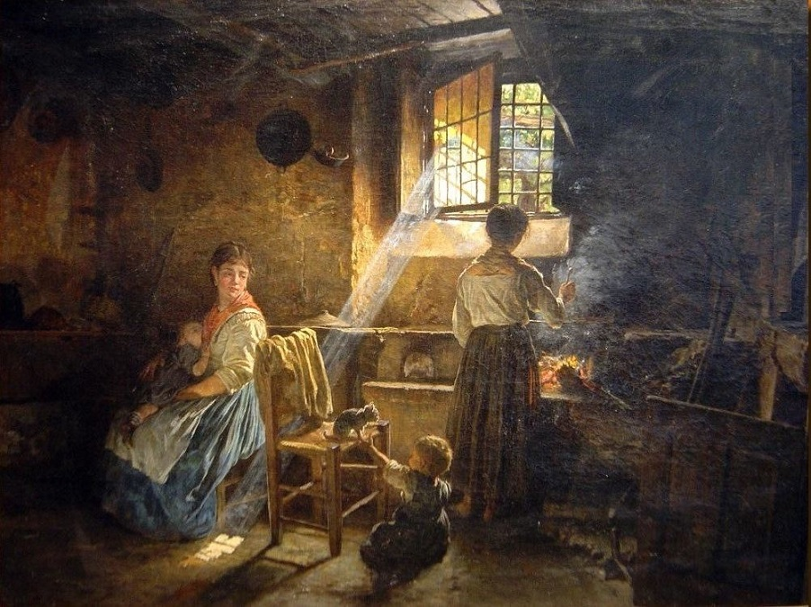 "Le gioie della famiglia", olio su tela, cm 40 x 65, collezione privata.